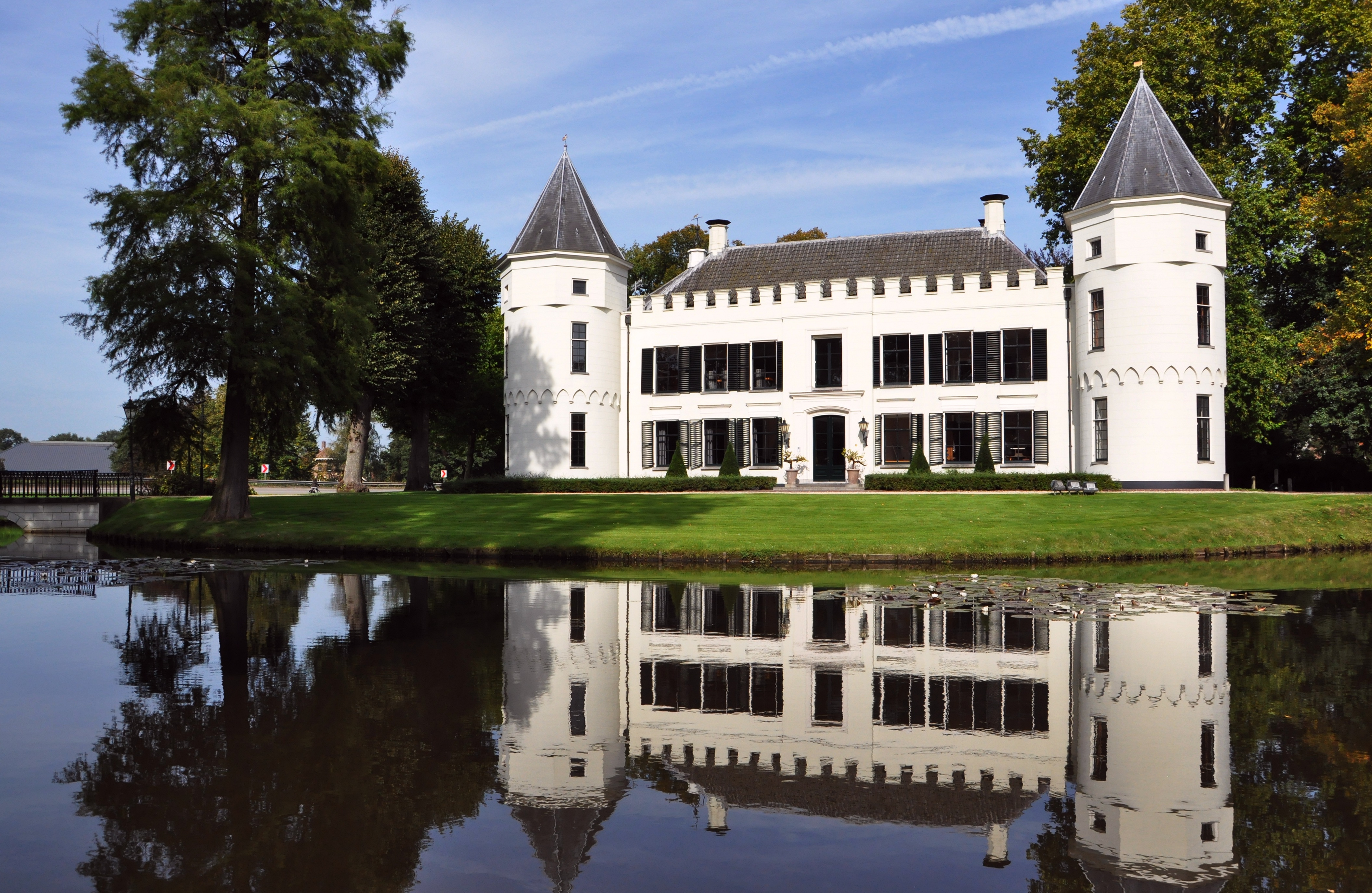 Huize Salentein in Nijkerk